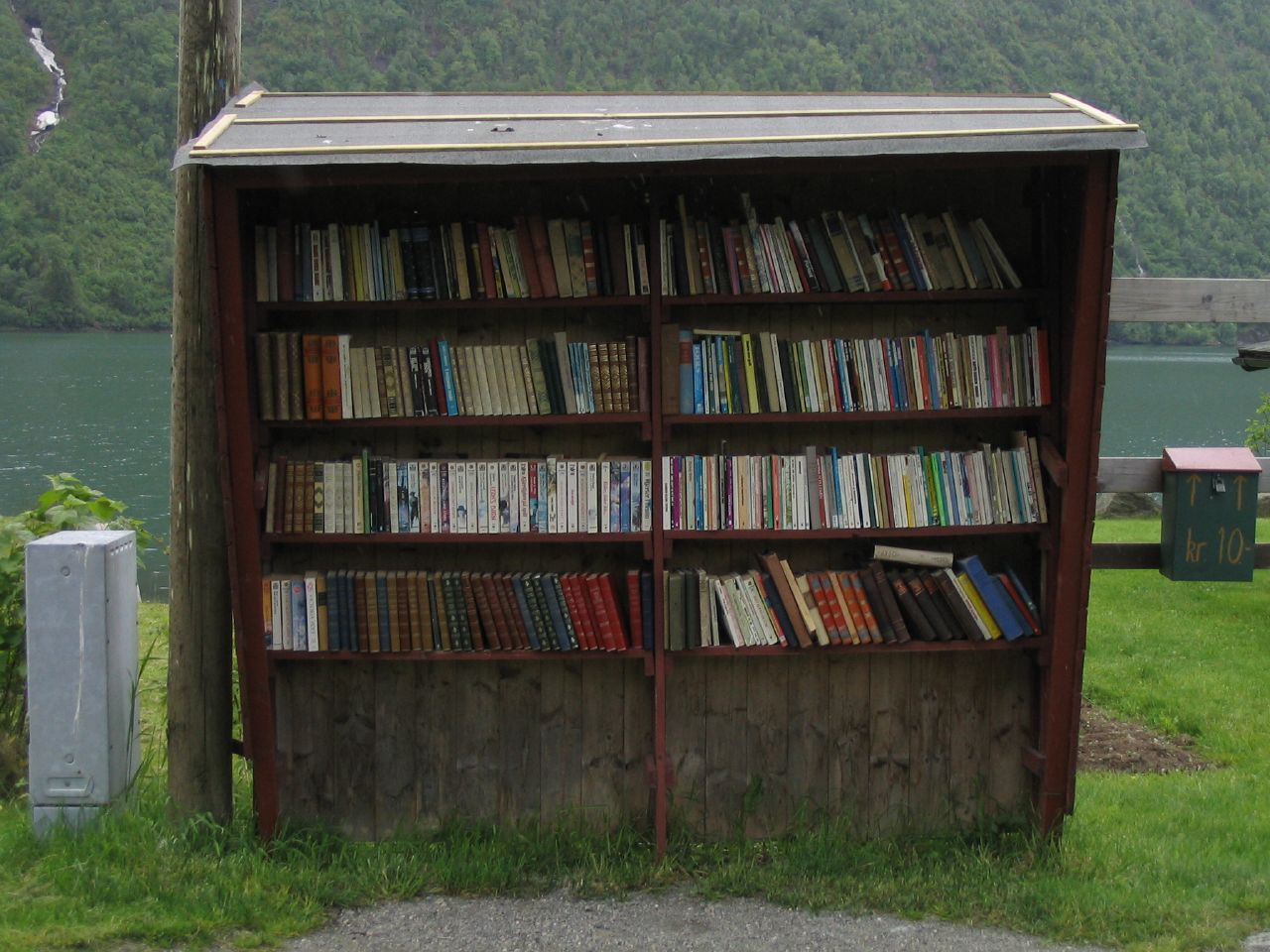 Frå Den norske bokbyen i Fjærland